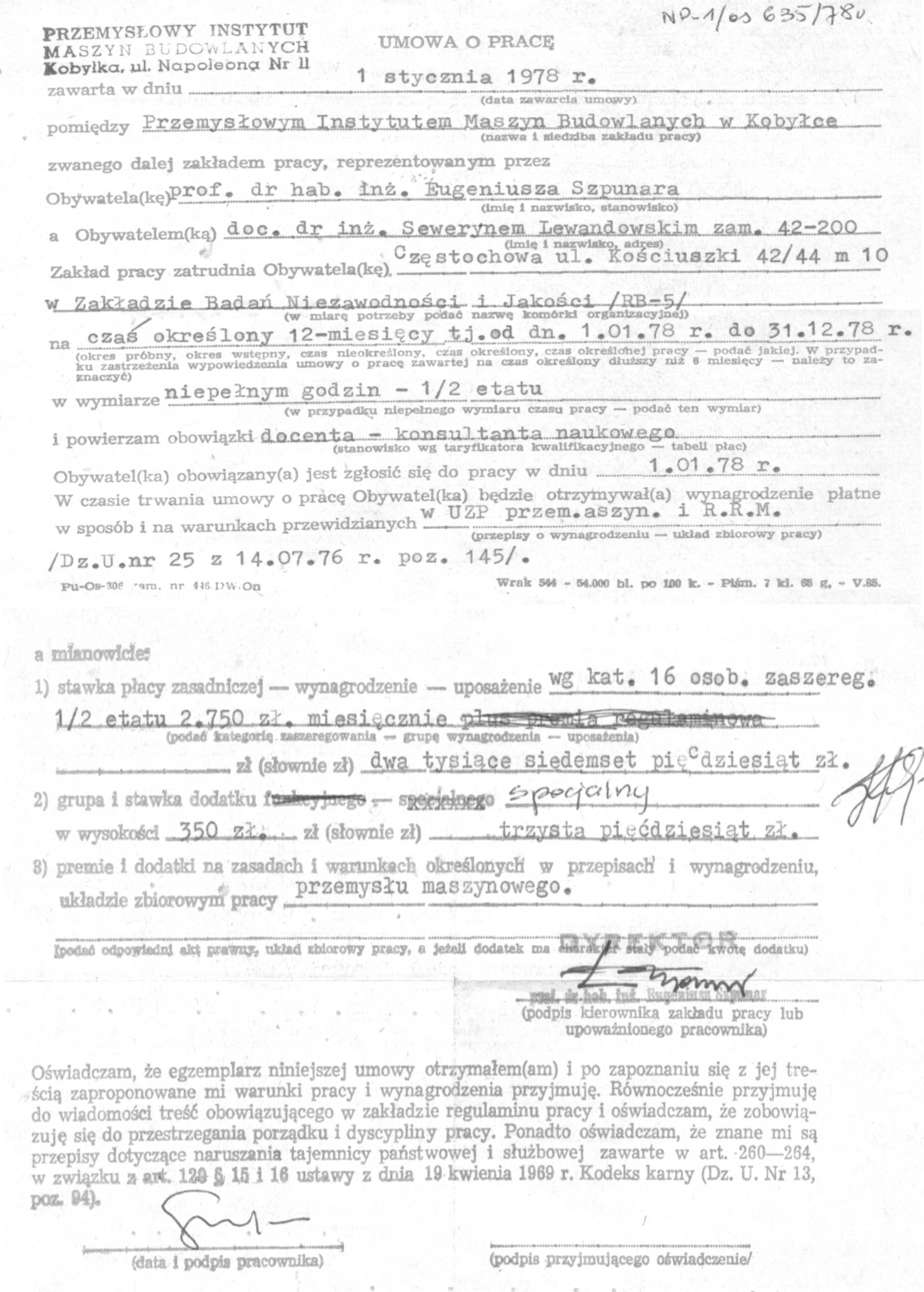 Poświadczenie zatrudnienia w Przemysłowym Instytucie Maszyn Budowlanych